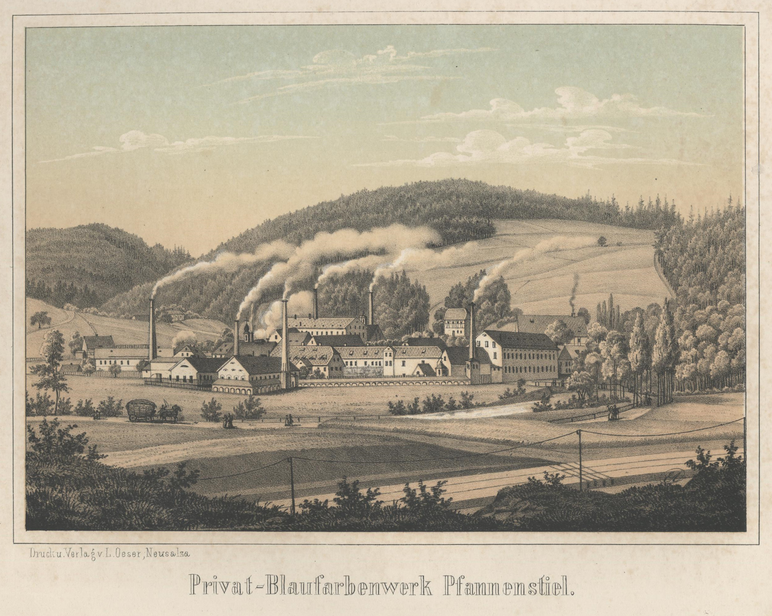 Privat-Blaufarbenwerk Pfannenstiel aus: Album der Sächsischen Industrie Erster Band